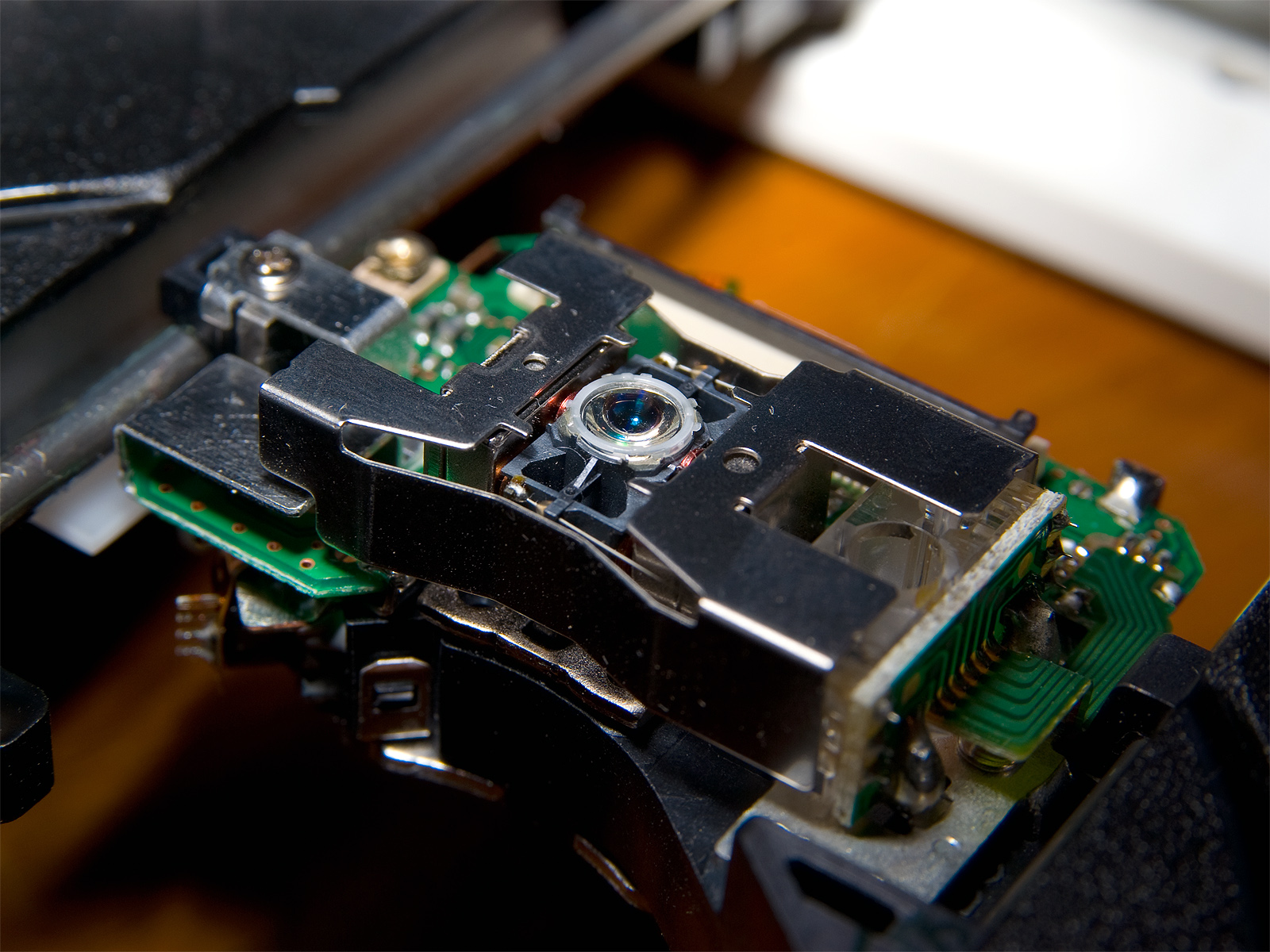 Schreib/Leselaser eines CD/DVD Laufwerks